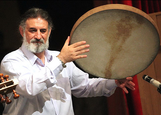 مراسم بزرگداشت مسعود حبیبی- سالن احسان شیراز - ۶ شهریور ۱۳۹۲